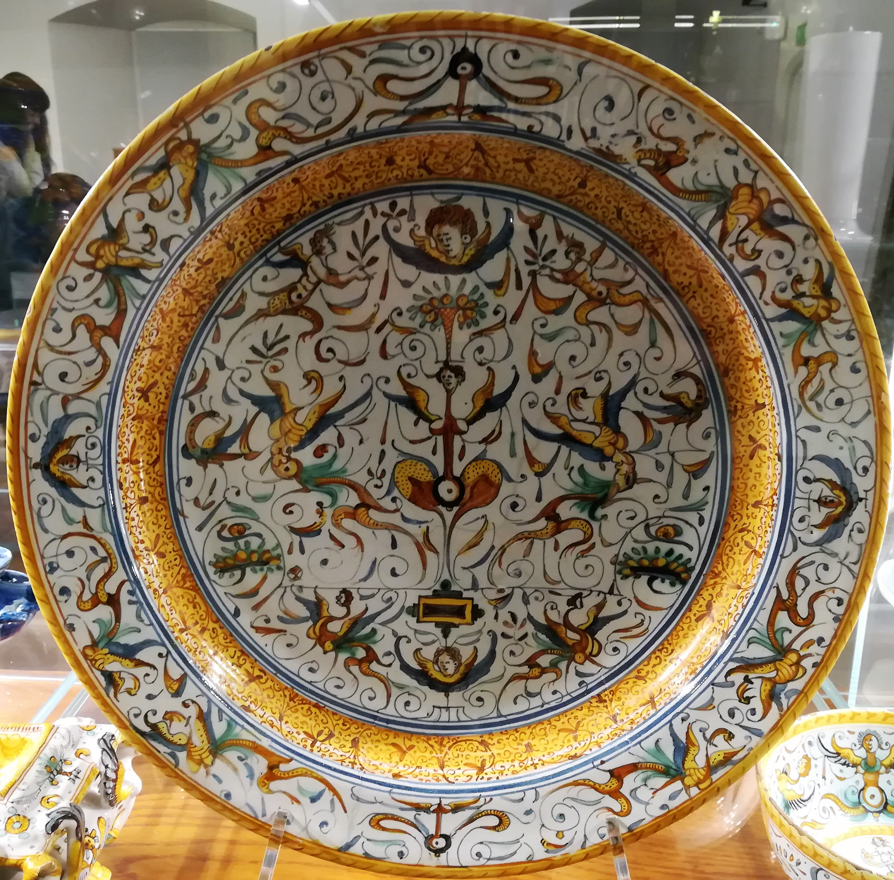 Piatto da pompa, Patanazzi, Urbino, Italia 1580-1600, majolika (Poznan, MSU).